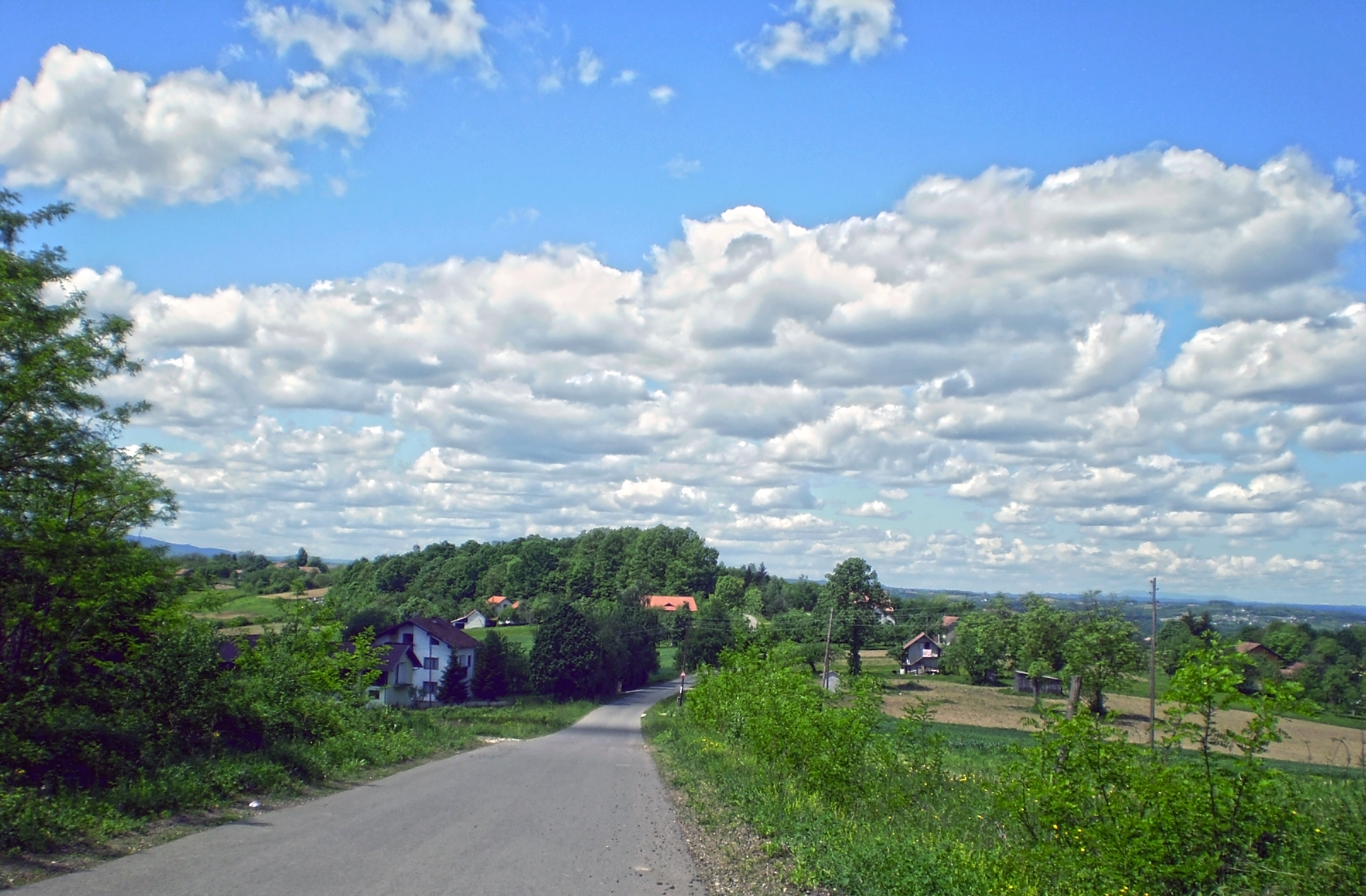 Доњи Церани